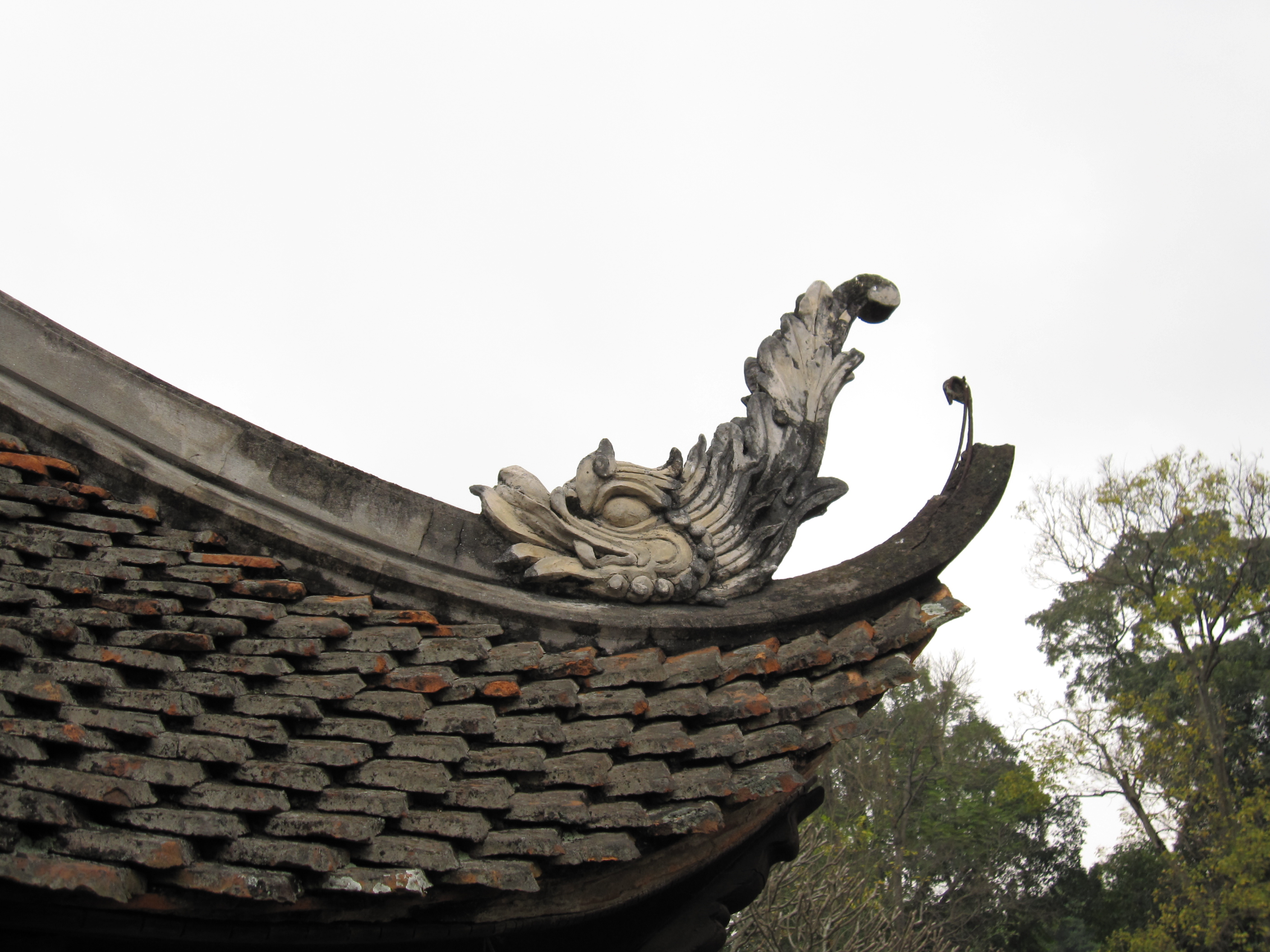 One Pillar Pagoda